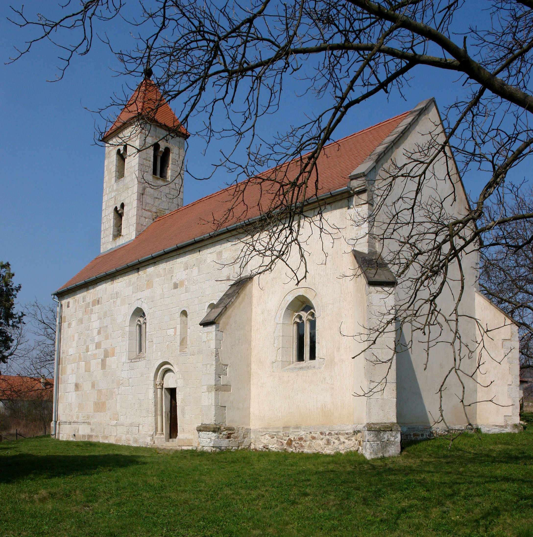 Felsőregmec